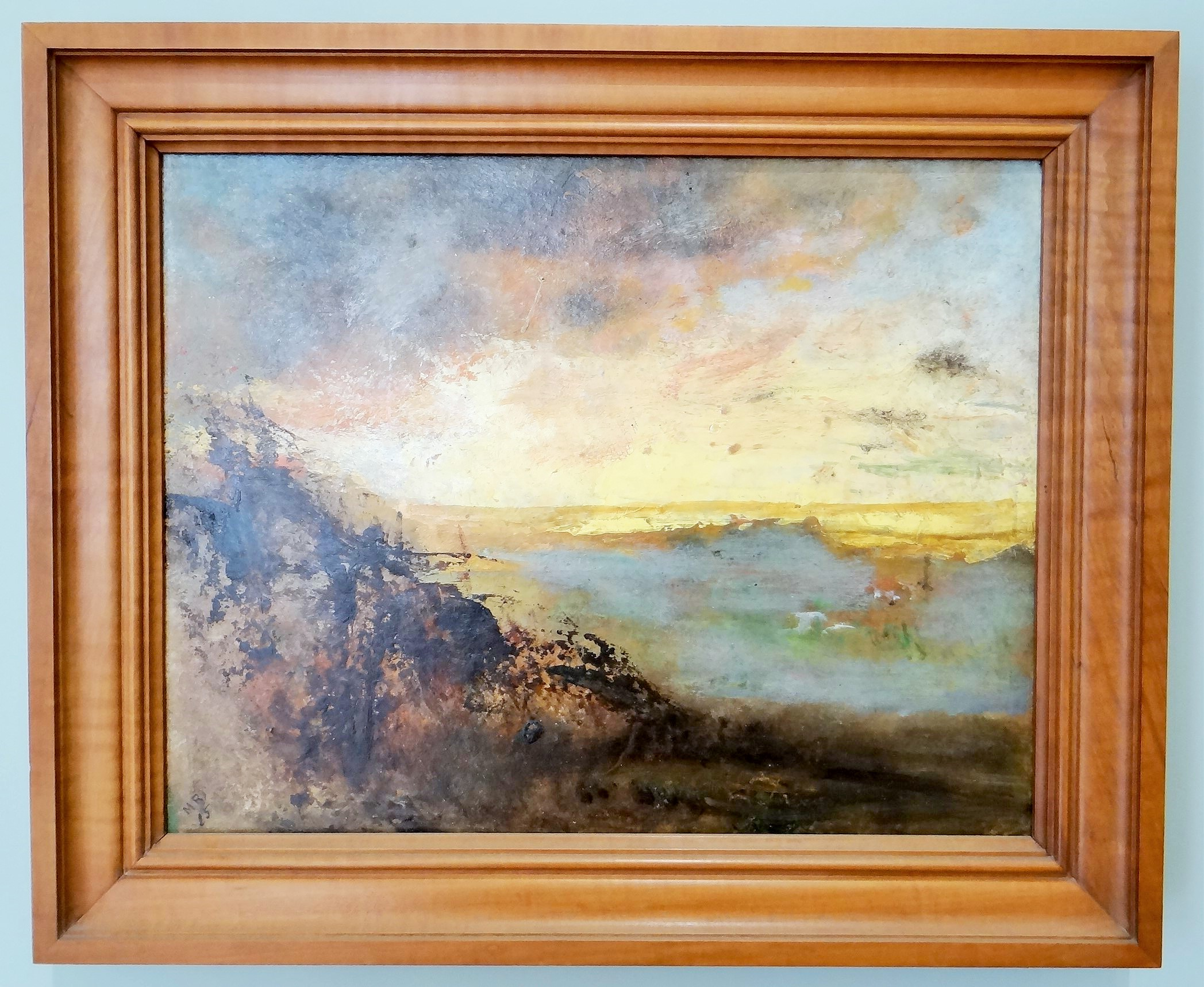 Auguste Rodin, Crépuscule d'or sur les dunes en forêt de Soignes, huile sur papier collé sur carton, Paris, musée Rodin.